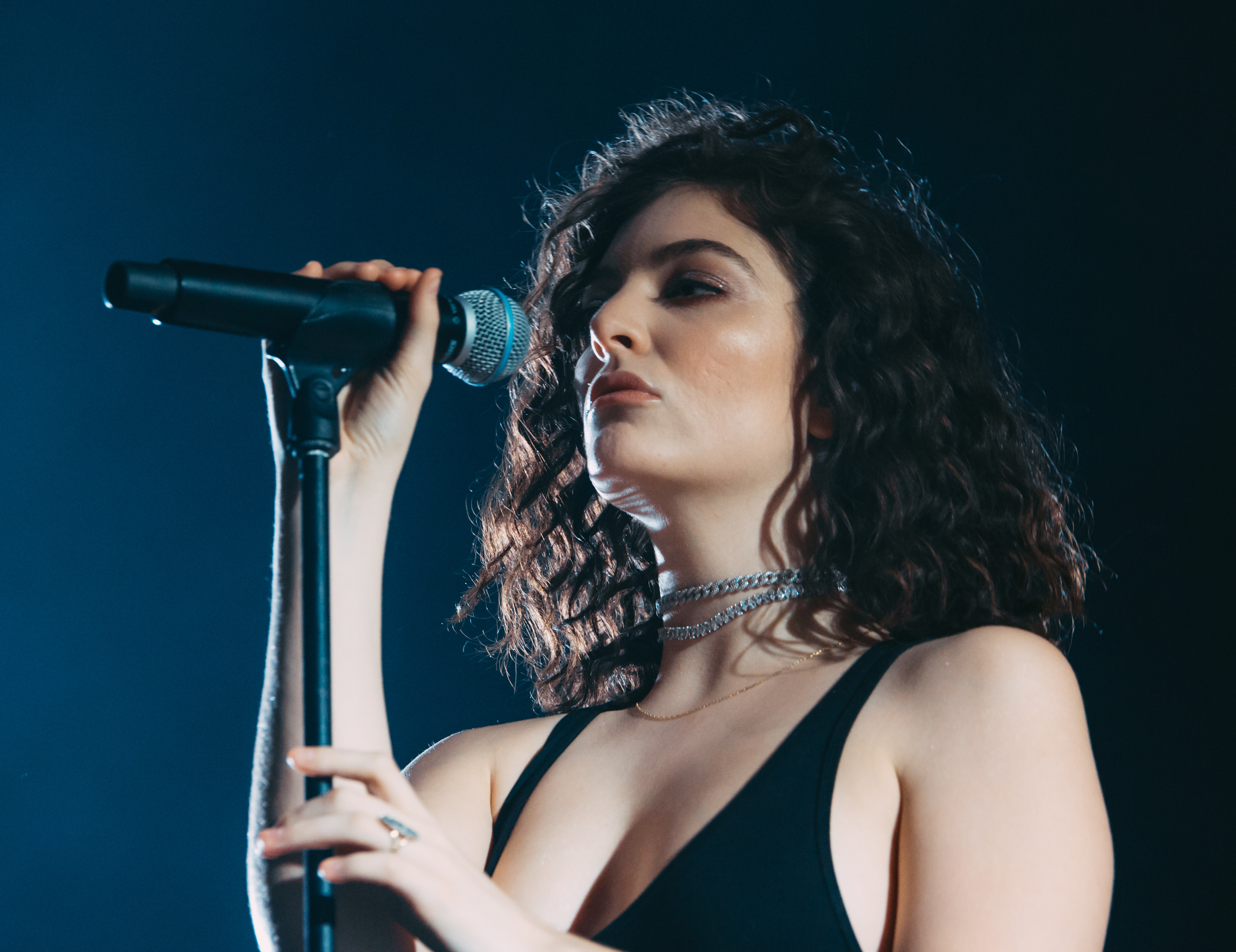 Photo: Krists Luhaers // @Kristsll